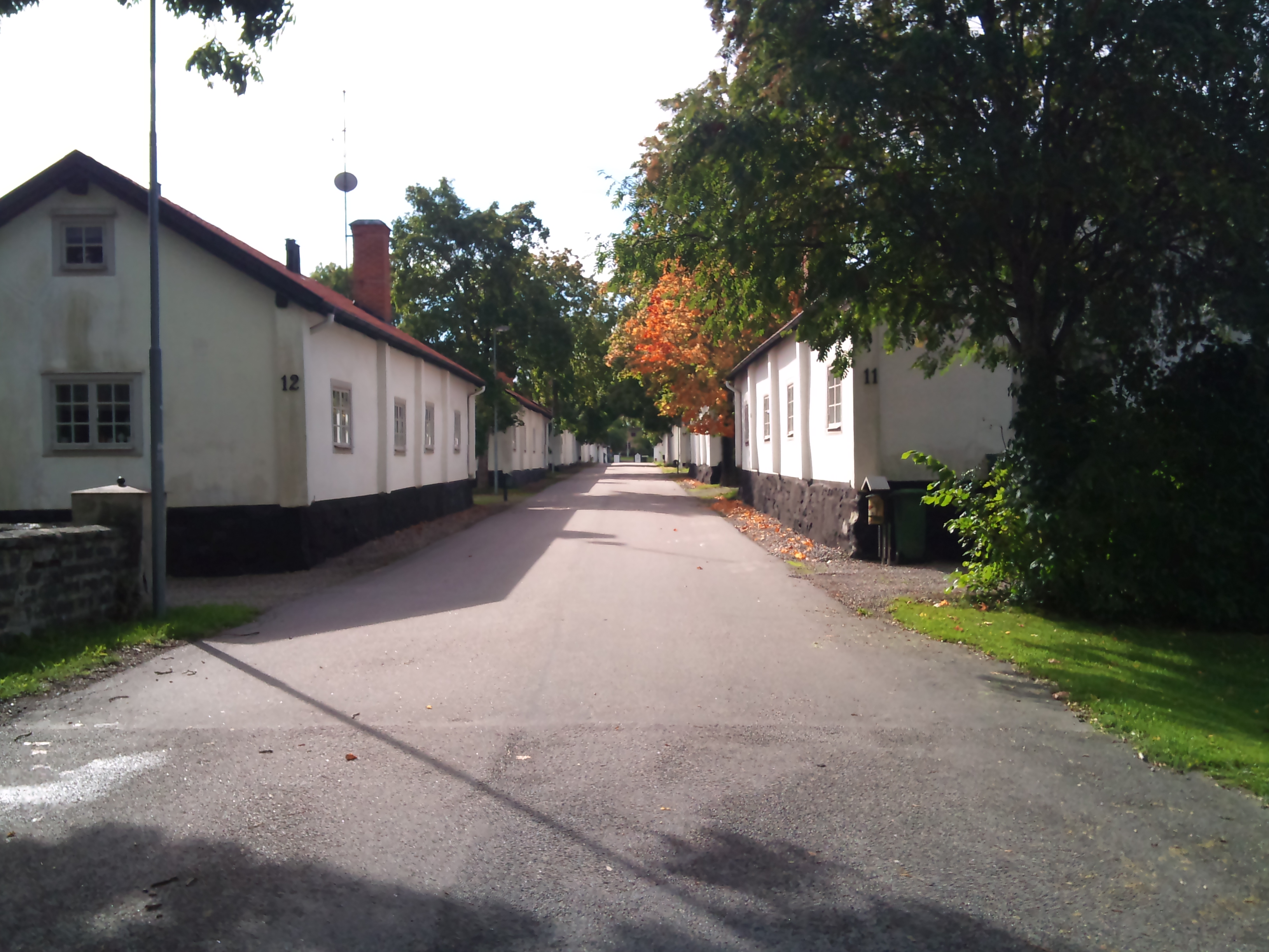 Nygatan i Söderfors. Riktning mot herrgården.